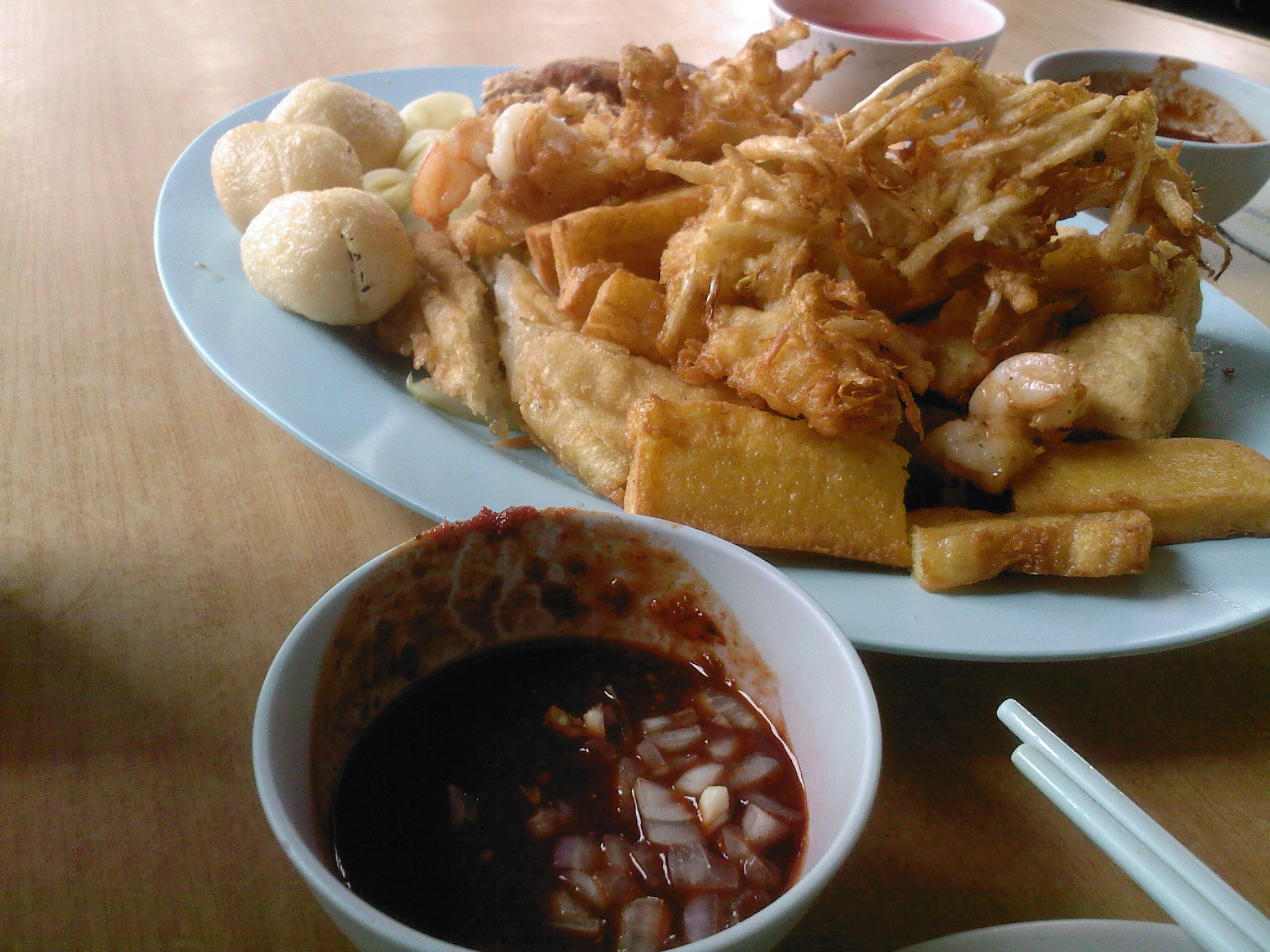 wu xiang